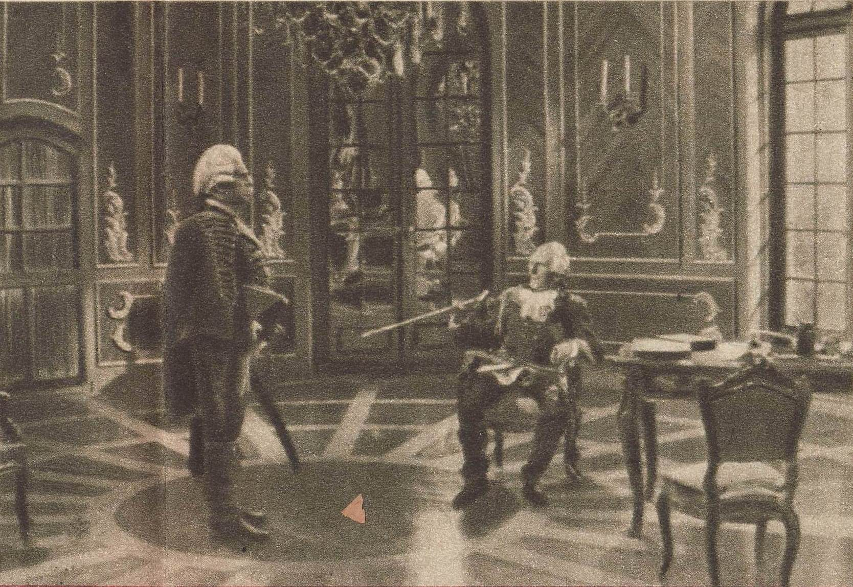 Ludwik Solski i Wojciech Brydziński w sztuce "Wielki Fryderyk" Adolfa Nowaczyńskiego, z filmu Geniusz sceny